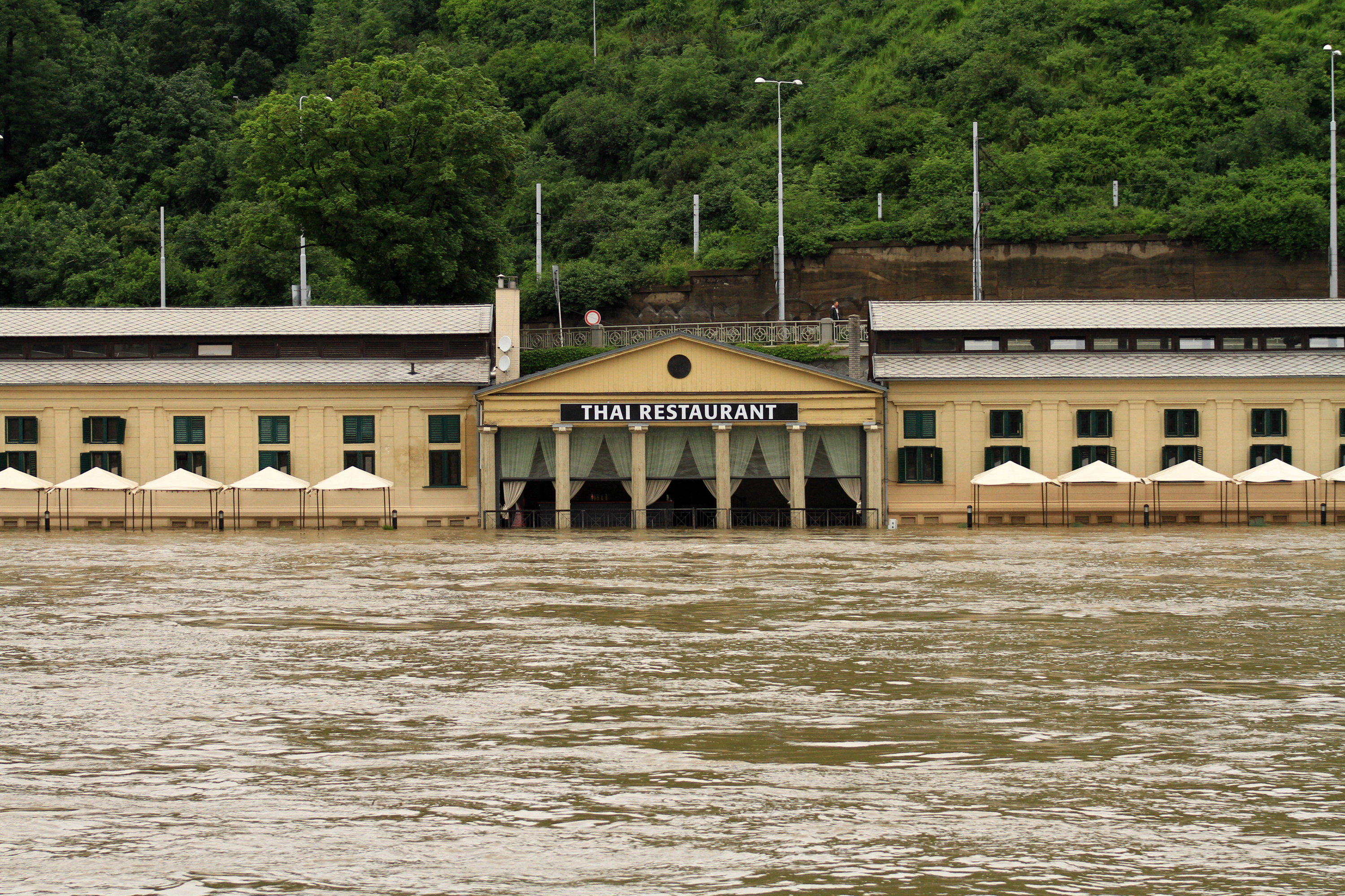 Občanská plovárna, Praha 7-Holešovice, nábřeží Edvarda Beneše 337/8. Místo v době povodní v červnu 2013.